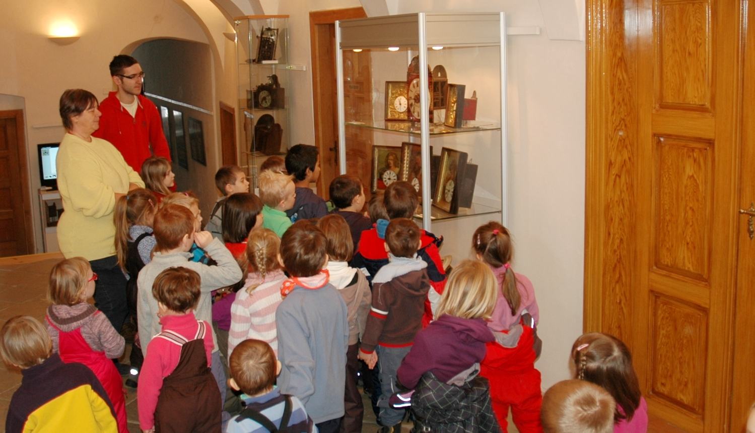 Prohlídka muzejní výstavy pro mateřské školy